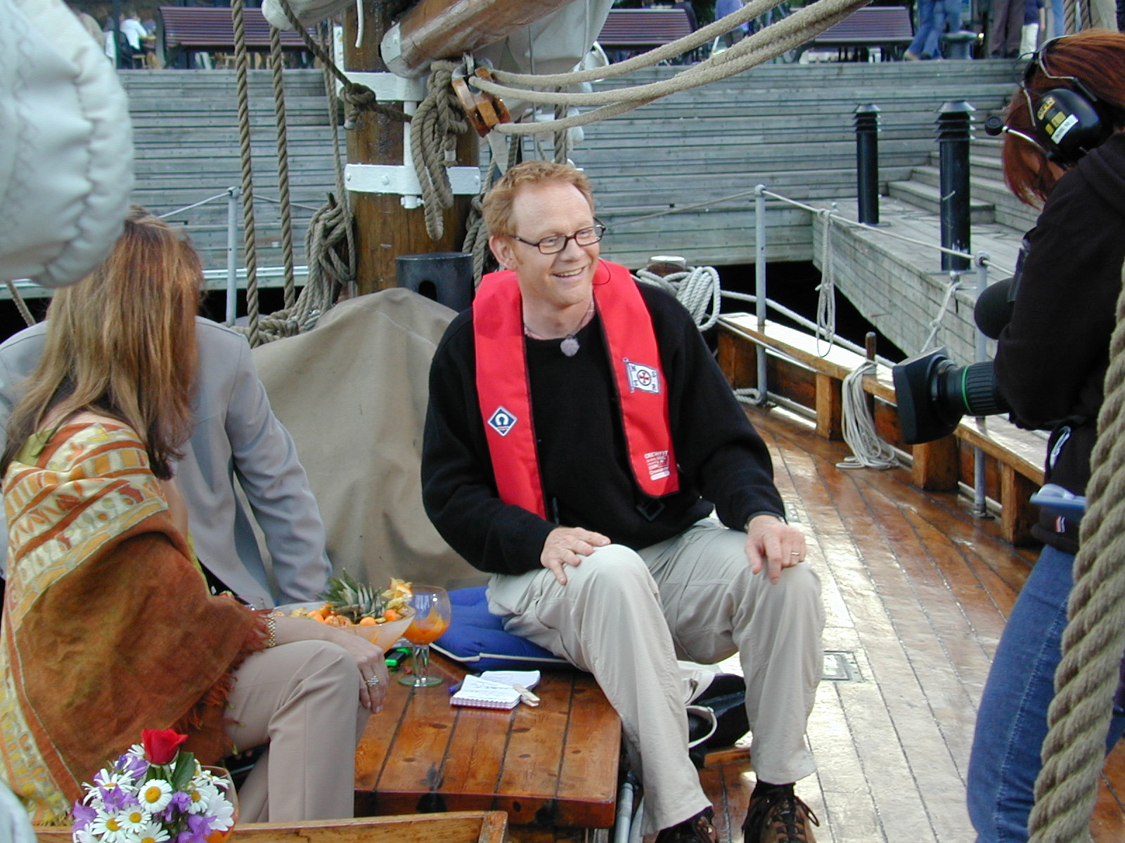 NRK "Sommeråpent" ombord på RS 5 "Liv" 5. juli 2002. Olav Viksmo Slettan fra NRK intervjuer Jens Ekornes og en designer.